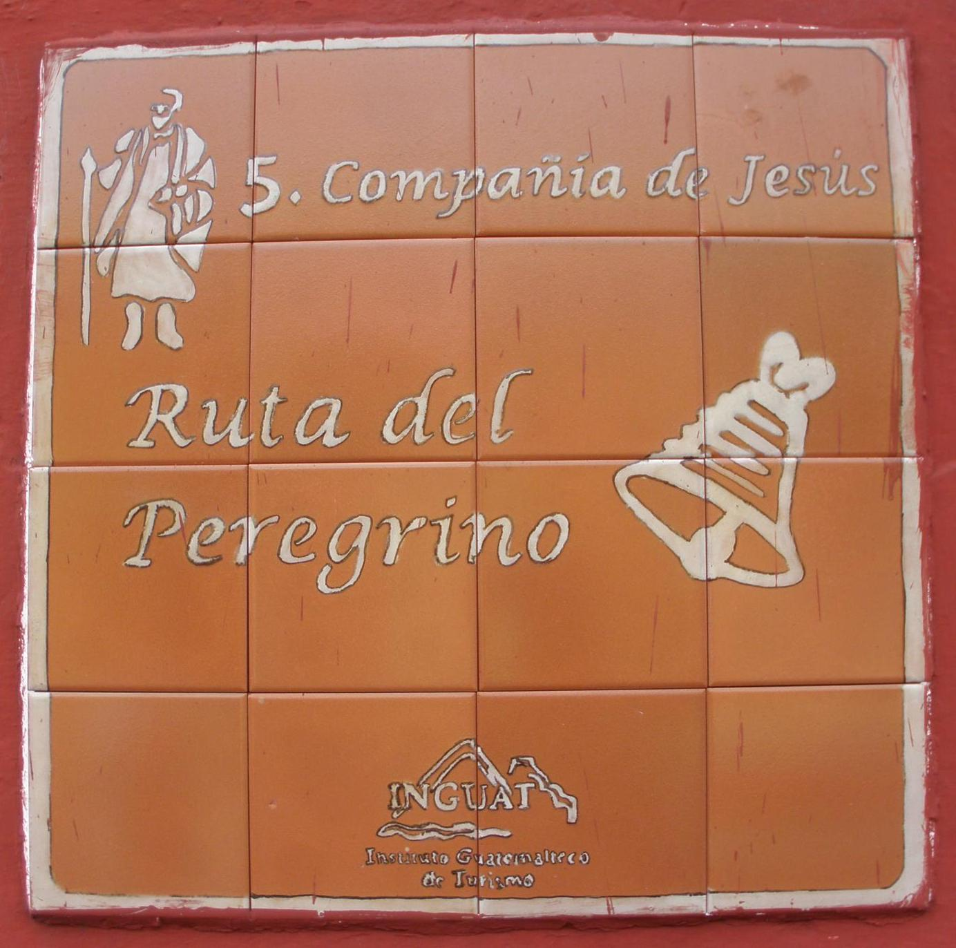 Ruta del Peregrino: etapa 5 de la Ruta del Hermano Pedro, correspondiente al antiguo Colegio de la Compañía de Jesús en La Antigua Guatemala, en donde se formó Pedro Betancourt y tomó su opción por los franciscanos.